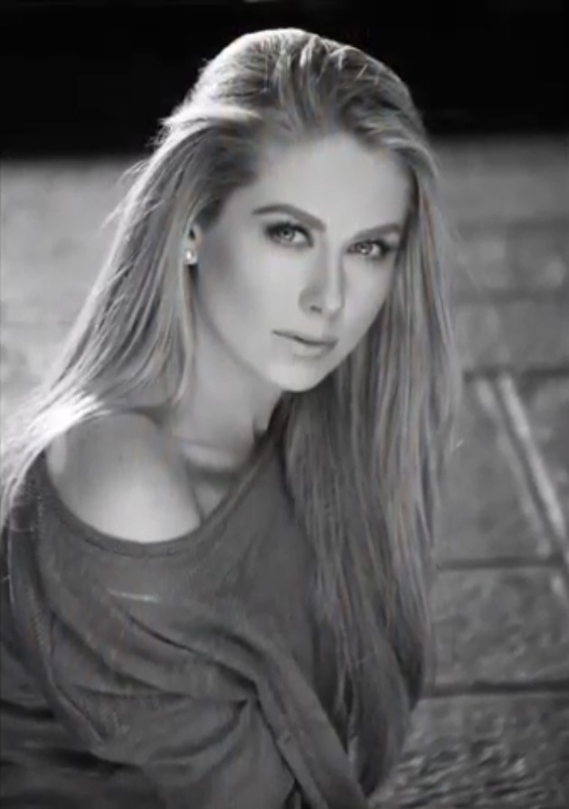 Ingrid Martz para Revista Ximena en 2018